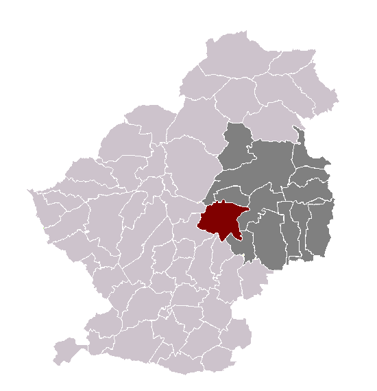 Pecquencourt dans son canton et son arrondissement